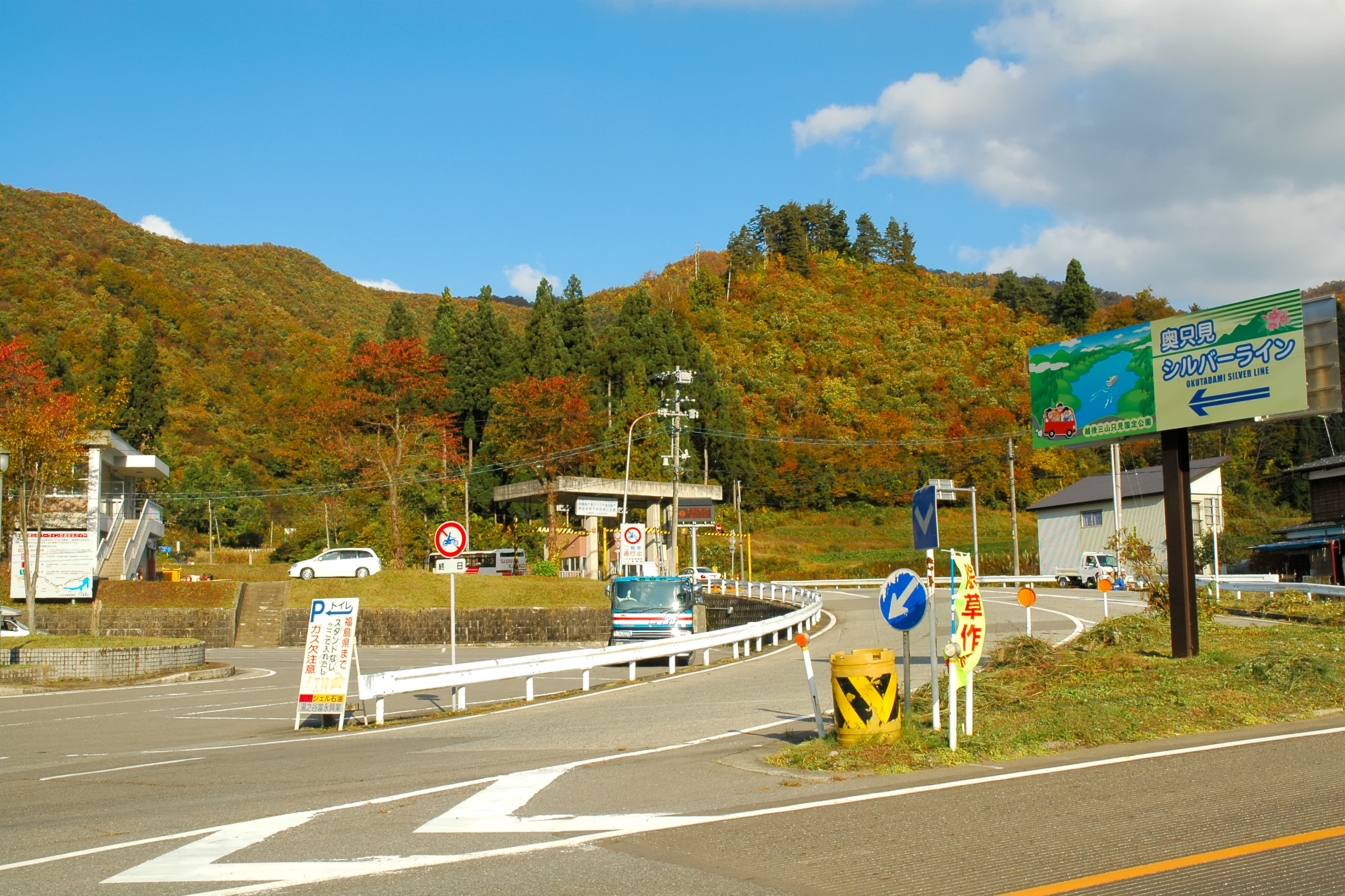 Niigata prefectural road route 50 Okutadami Silver Line (新潟県道50号小出奥只見線奥只見シルバーライン上折立側出入口)